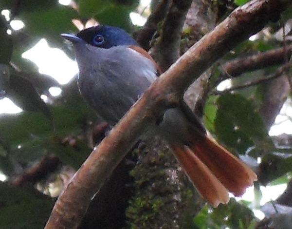 Oiseau La Vierge mâle, Hauts de Bras-Panon.